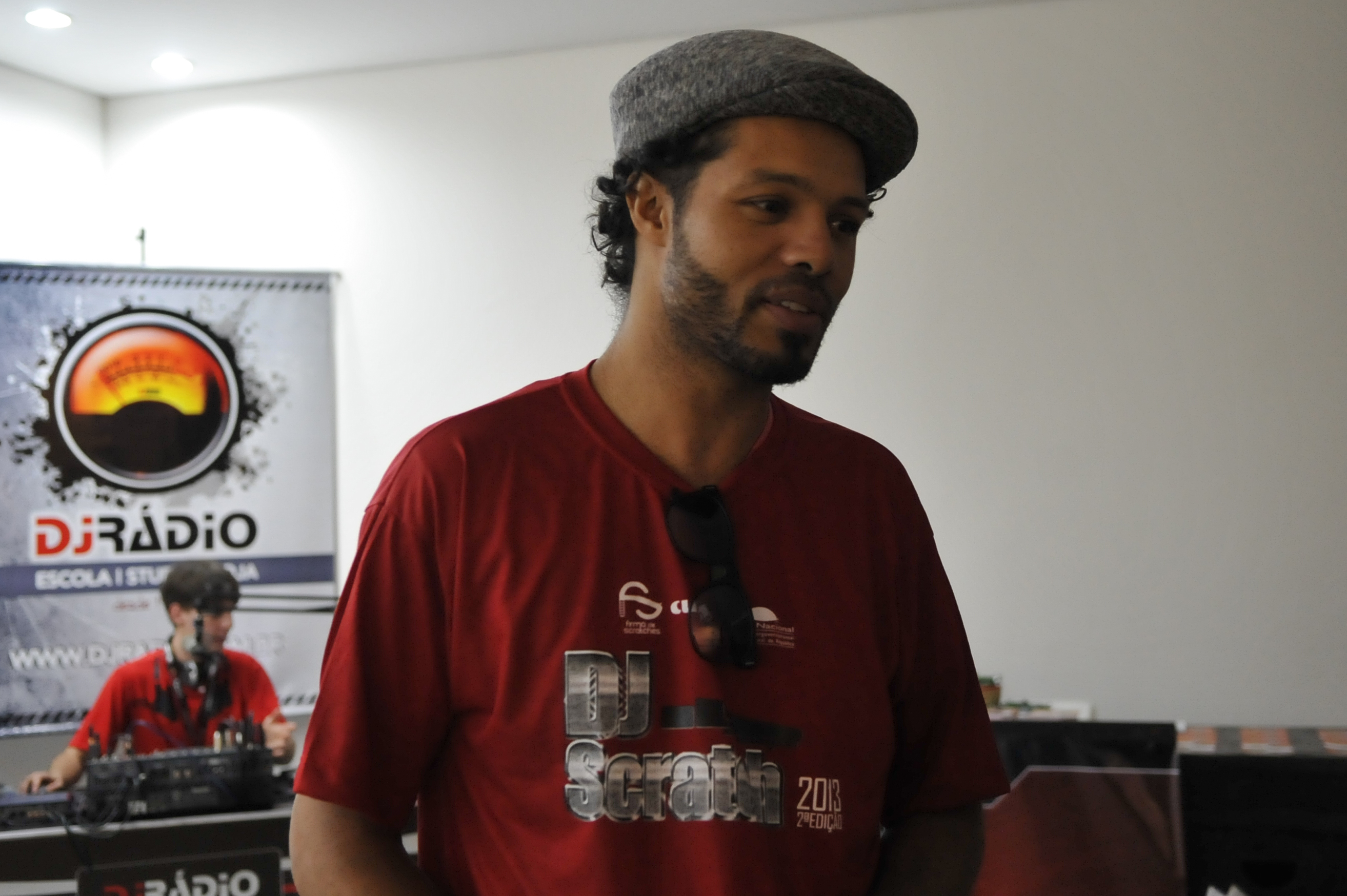 A principal competição de DJs do Brasil, intitulada DJ Scratch, foi criada em 2012 por um grupo de DJs de Brasília especializados no método conhecido como turntablism - criação de sons e músicas a partir de aparelhos de fonógrafo e mixer. A primeira edição do evento reuniu 400 visitantes e oito competidores. Este ano, na segunda edição, a expectativa é que cerca de 800 pessoas acompanhem a disputa entre os 12 competidores. Na foto, o DJ Higo Melo. Foto: Antonio Cruz/ABr 11/08/2013